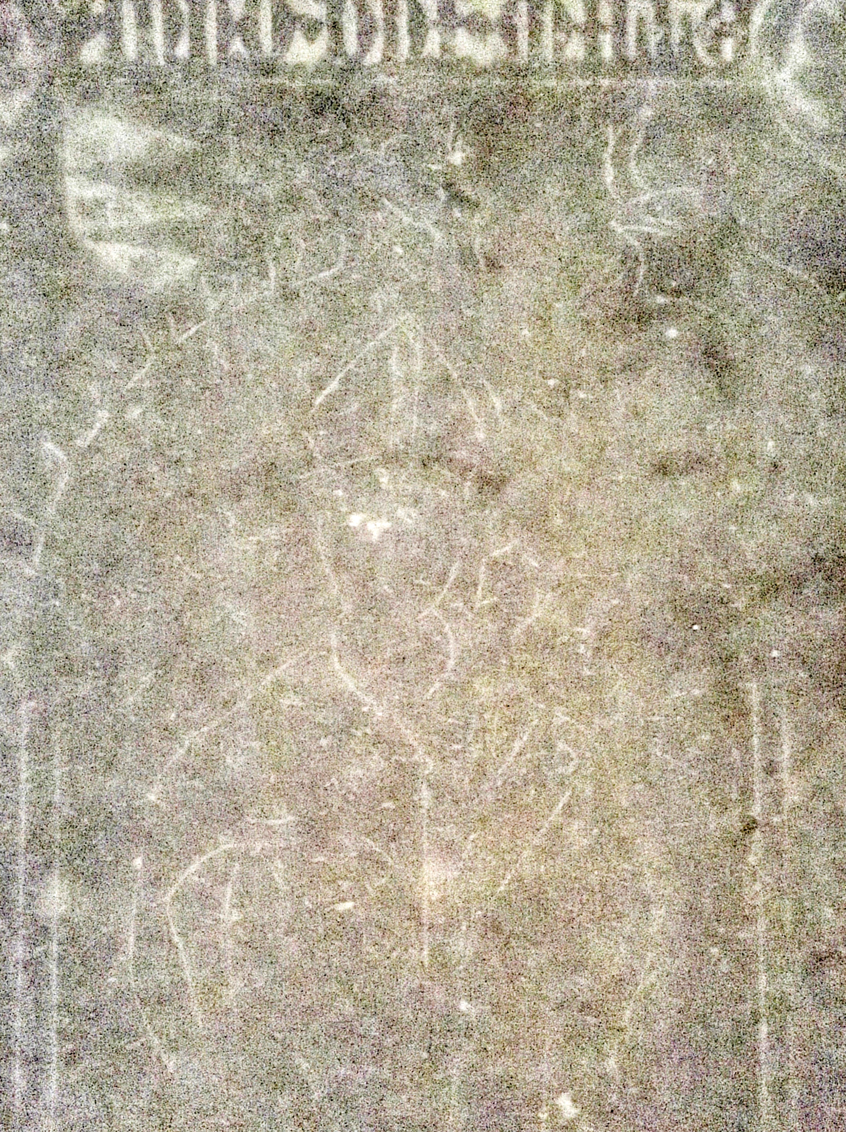 Detalje fra gravsten tilhørende Jakob Gertsen Ulfstand (d. 1410), ærkebiskop i Lund. Øverst til venstre skimtes hans våben. Lund Domkirkes krypt.